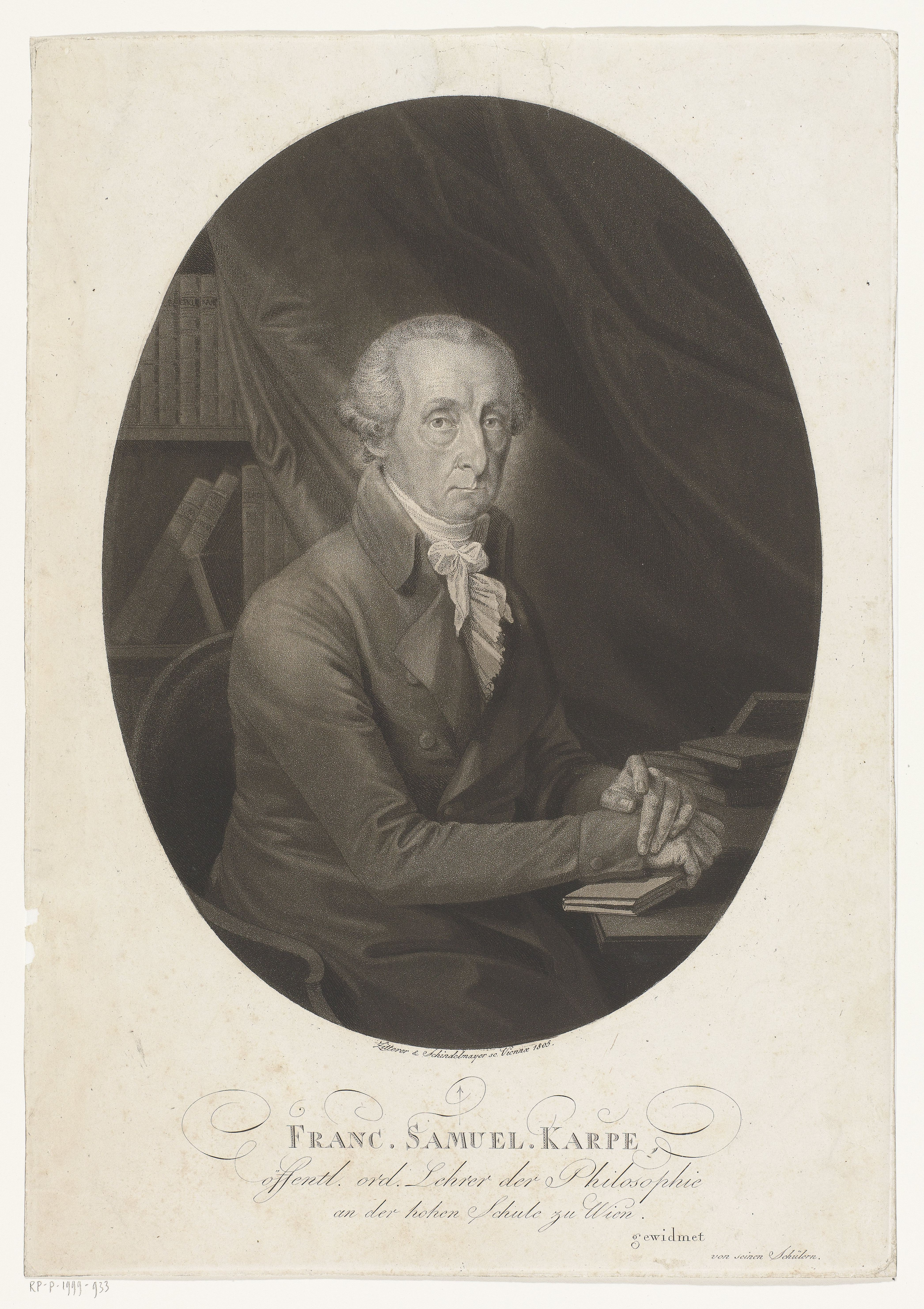 IdentificatieTitel(s): Portret Franz Samuel KarpeObjecttype: prent Objectnummer: RP-P-1999-933Opschriften / Merken: verzamelaarsmerk, verso, gestempeld: Lugt 2228verzamelaarsmerk, verso, gestempeld: Lugt 2760VervaardigingVervaardiger: prentmaker: Schindelmayer (vermeld op object)prentmaker: Johann Zitterer (vermeld op object)Datering: na ca. 1790 - voor 1840Materiaal: papier Techniek: aquatintAfmetingen: plaatrand: h 377 mm × b 261 mmOnderwerpWat: historical personsWie: Franz Samuel KarpeVerwerving en rechtenCredit line: Aankoop uit het F.G. Waller-FondsVerwerving: aankoop 1999Copyright: Publiek domein